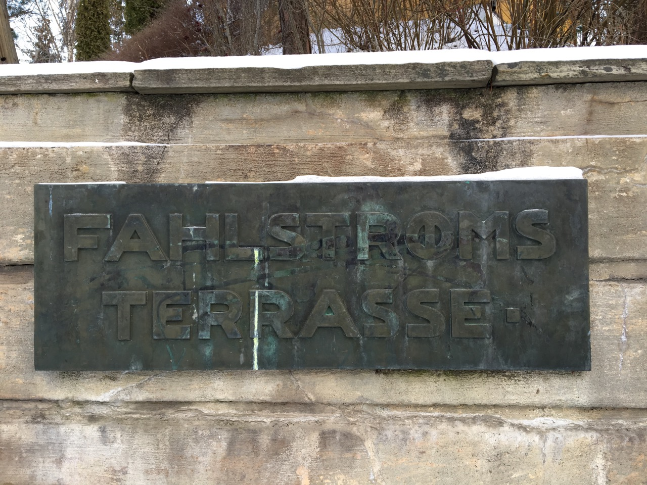 Skilt nederst i Fahlstrøms terasse.